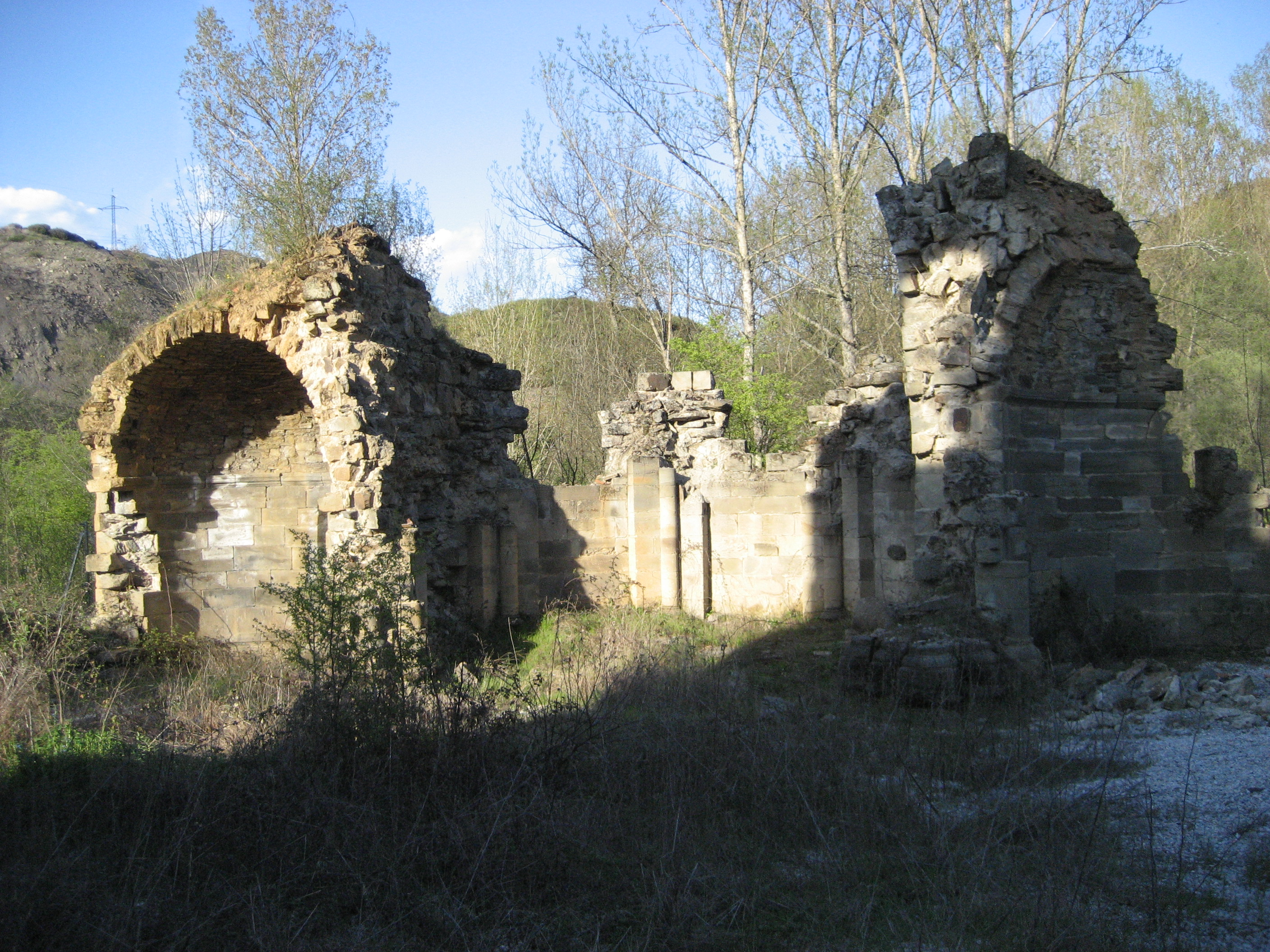 Restos de la cabecera de la iglesia del Monasterio de San Juan de Montealegre en la Región de El Bierzo